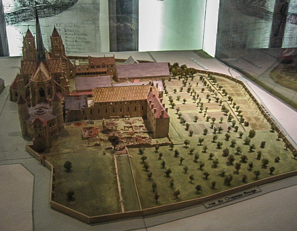 Maquette de l'ancienne abbaye Saint-Bénigne de Dijon au musée archéologique de Dijon